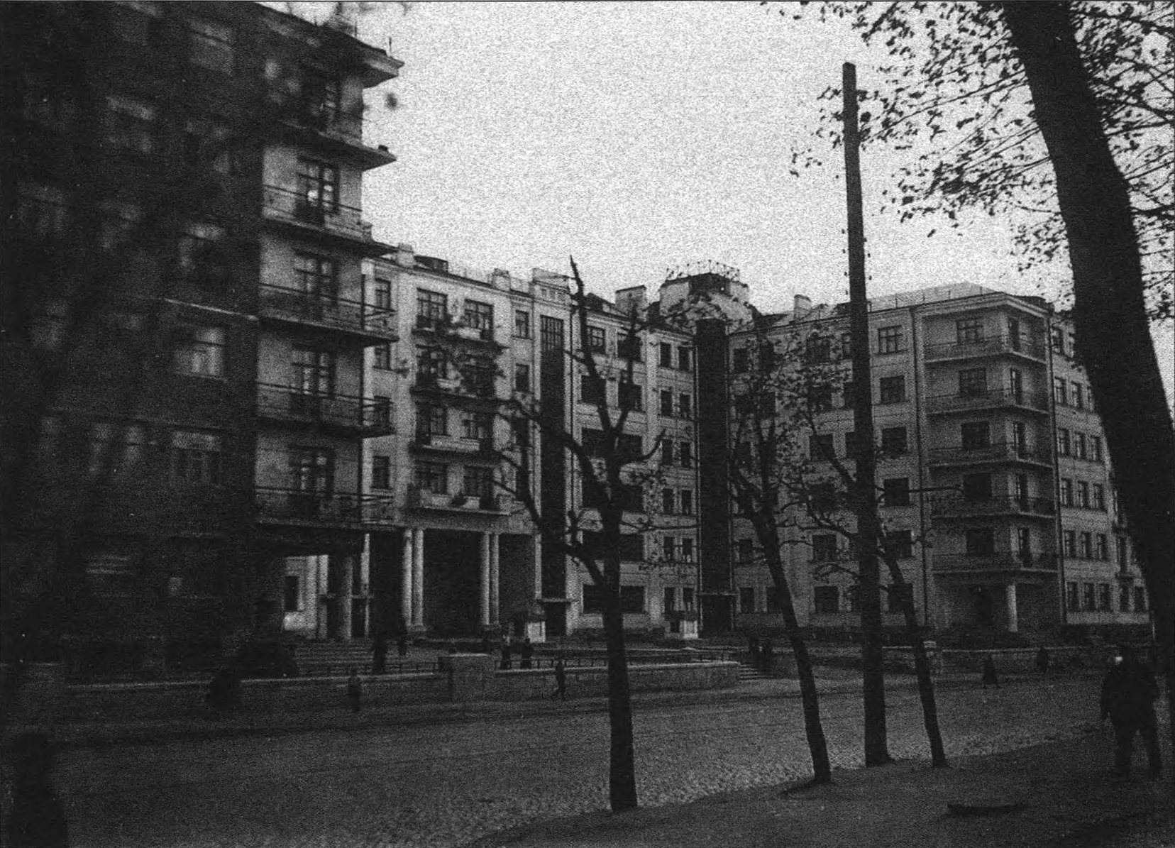 Беларуская (тарашкевіца): Менск (Miensk), Залатая Горка (Załataja Horka). Дом спэцыялістаў